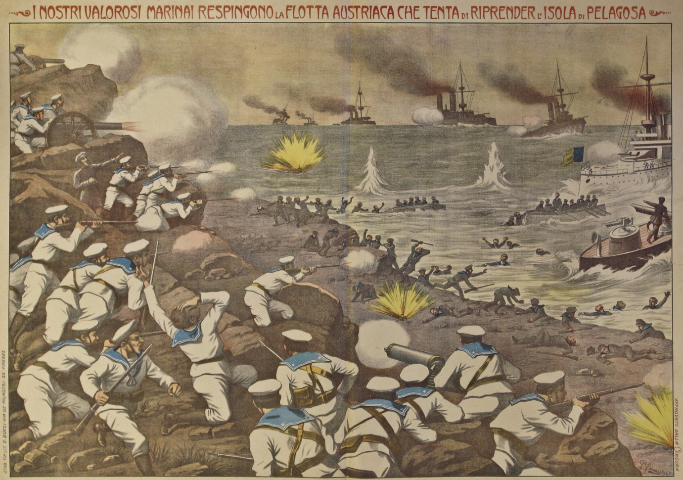 Difesa isola di Pelagosa da aprte dei mariani italiani contro austriaci